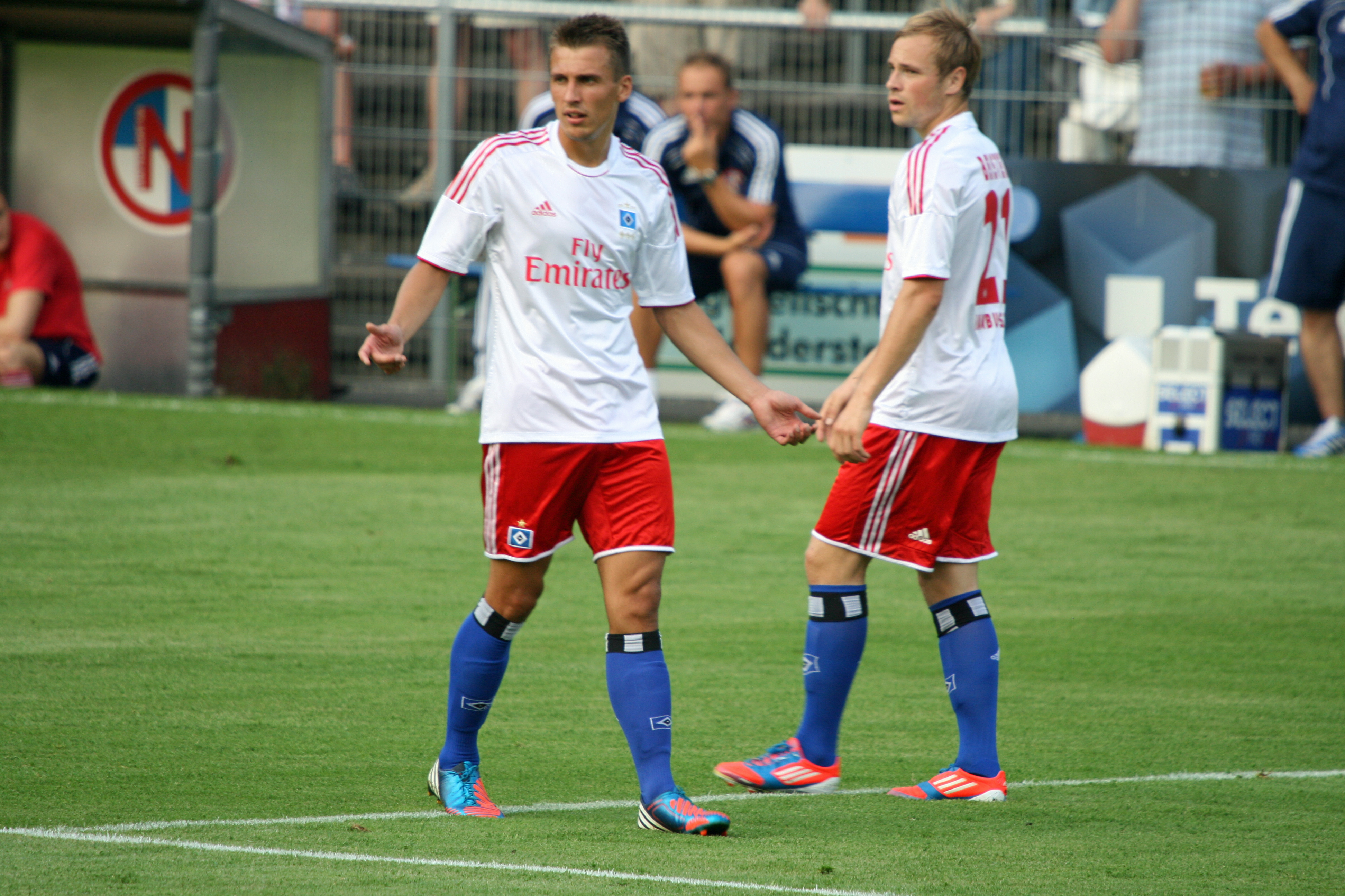 Robert Tesche mit dem Hamburger SV beim Testspiel bei Eintracht Norderstedt ; rechts Maximilian Beister, Nr 21 / Juli 2012